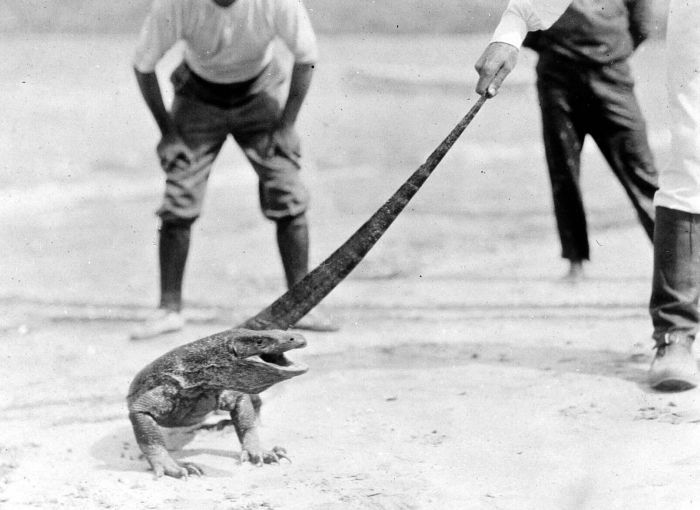 Repronegatief. Varanus komodoensis die geplaagd wordt